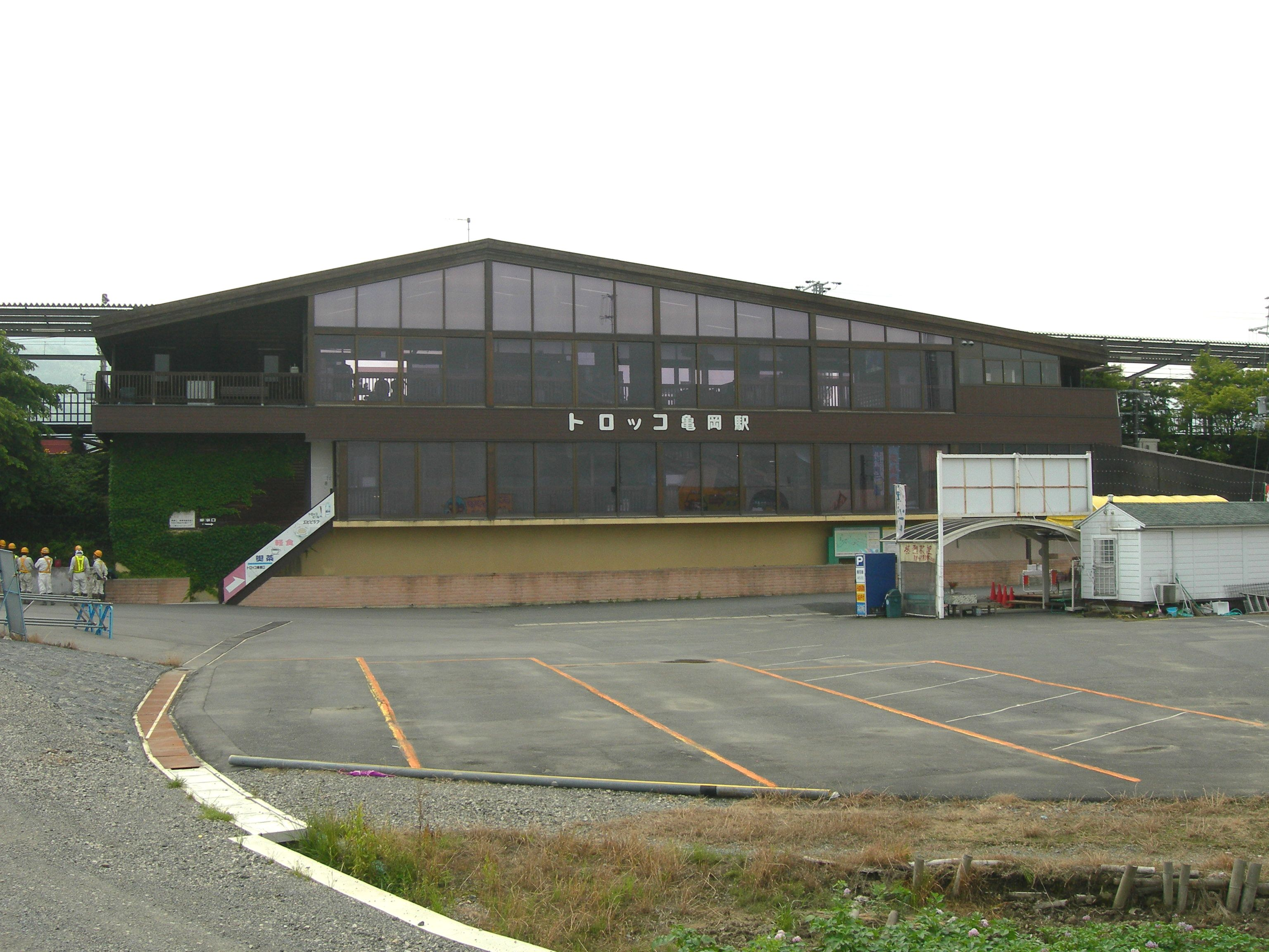 トロッコ亀岡駅